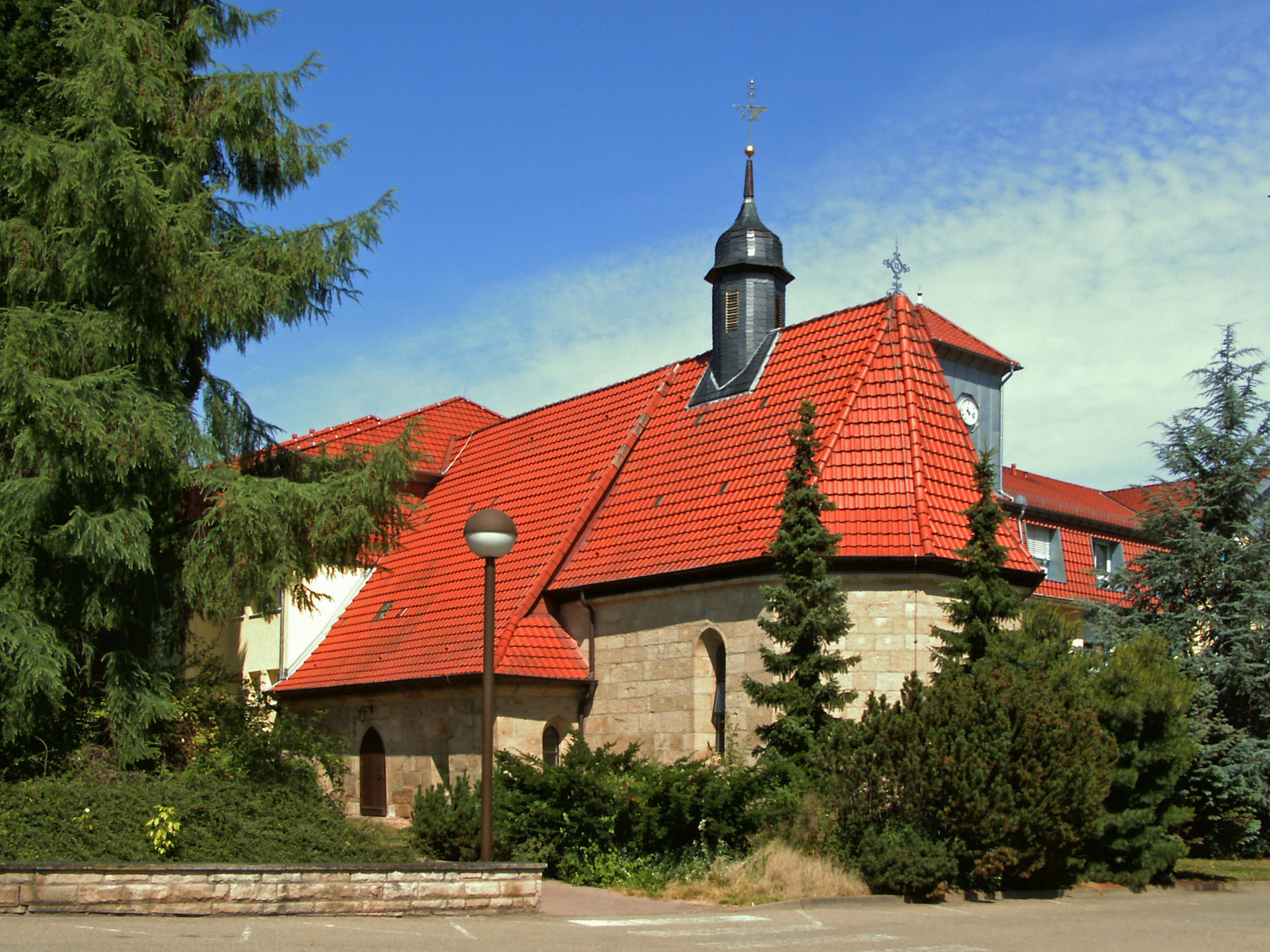 Kirche des Krankenhauses St. Martini in Duderstadt, Landkreis Göttingen